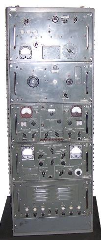 Wojskowy odbiornik radiowy BERYL-2. Produkcji rosyjskiej z wyposażenia radiostacji krótkofalowej dużej mocy R-110. Zdjęcie pochodzi ze strony